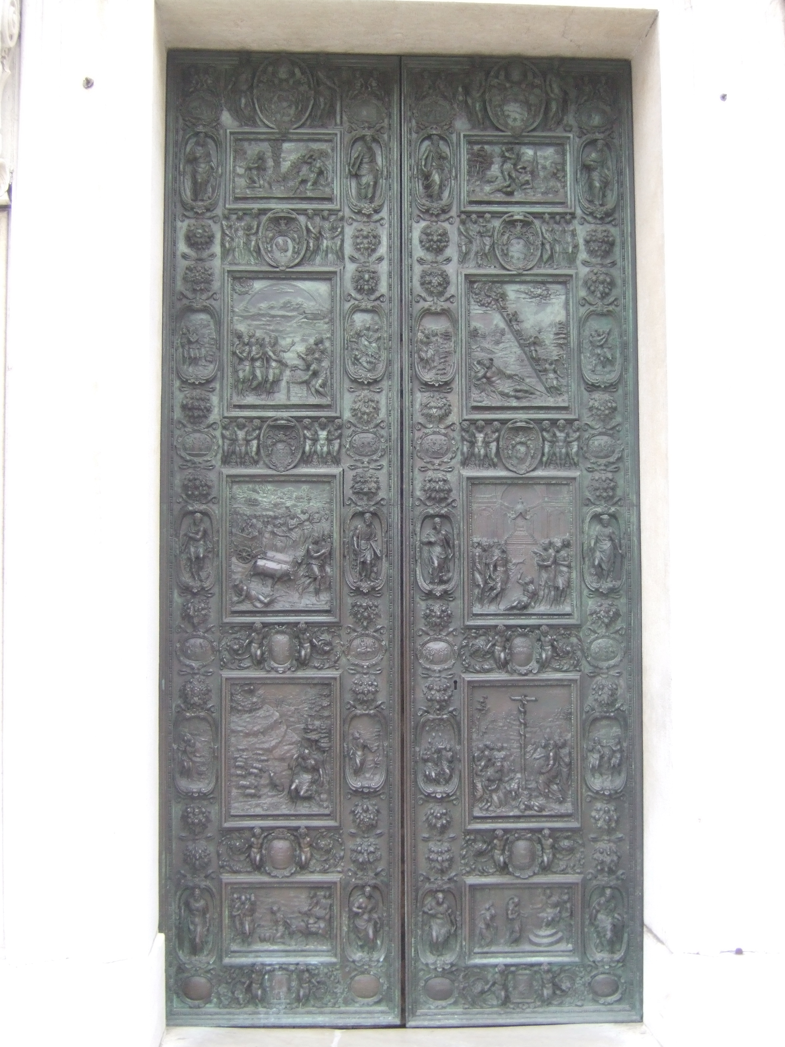 Santuario della Santa Casa (Loreto) - Porta bronzea di destra opera di Antonio Calcagni